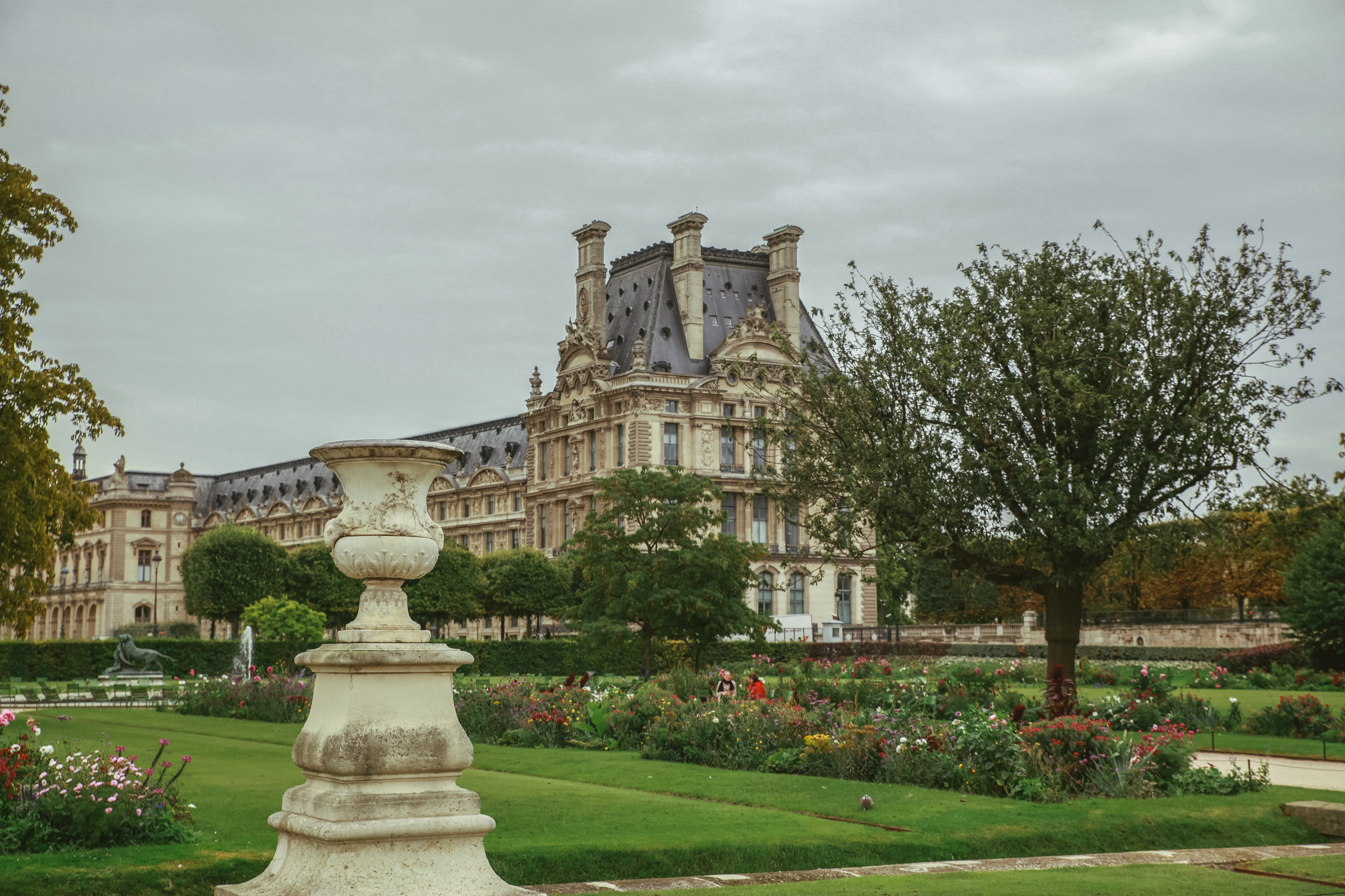 Jardin des Tuileries, Paris.